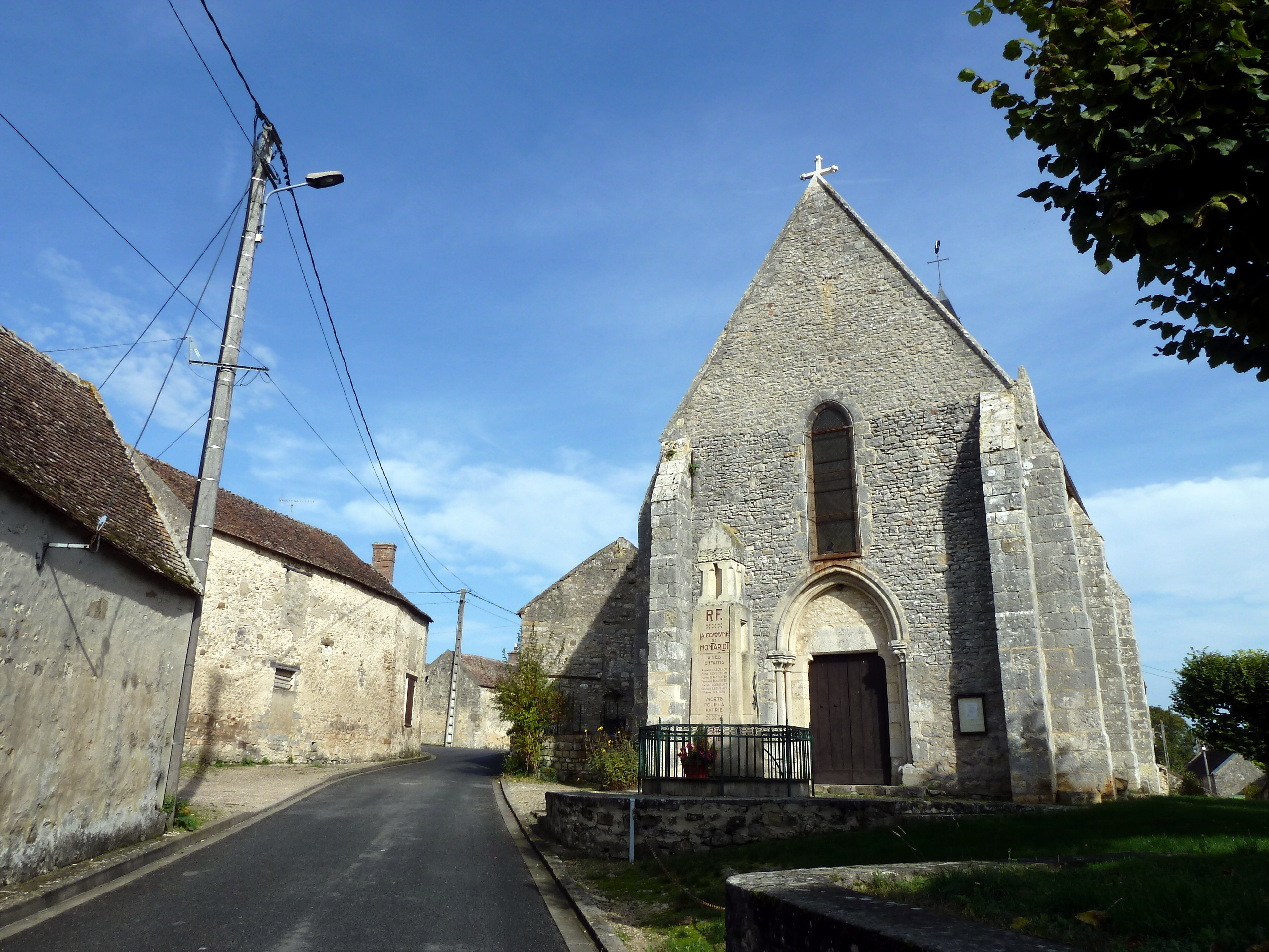 Église Saint-Mammes de Montarlot, (Classé, 1908) nichée au centre de ce petit village aux petites rues tortueuses, cette église est dédiée à saint Mammès, l'un des bergers alertés par les anges de la naissance de Jésus-Christ. Il prêche cette naissance aux bêtes sauvages qui, apprivoisées, mettent en fuite les archers de l'empereur Aurélien venus l'arrêter. Il est capturé et jeté aux lions, mais ceux-ci se couchent à ses pieds. Resté cinq jours dans une fournaise, il est finalement étripé. .